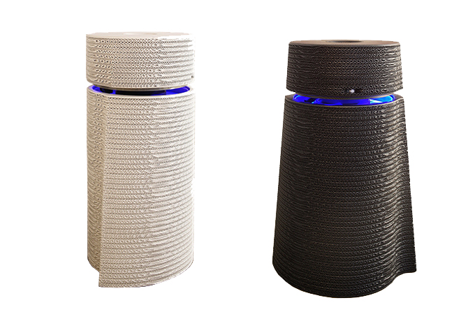 U-EARTH